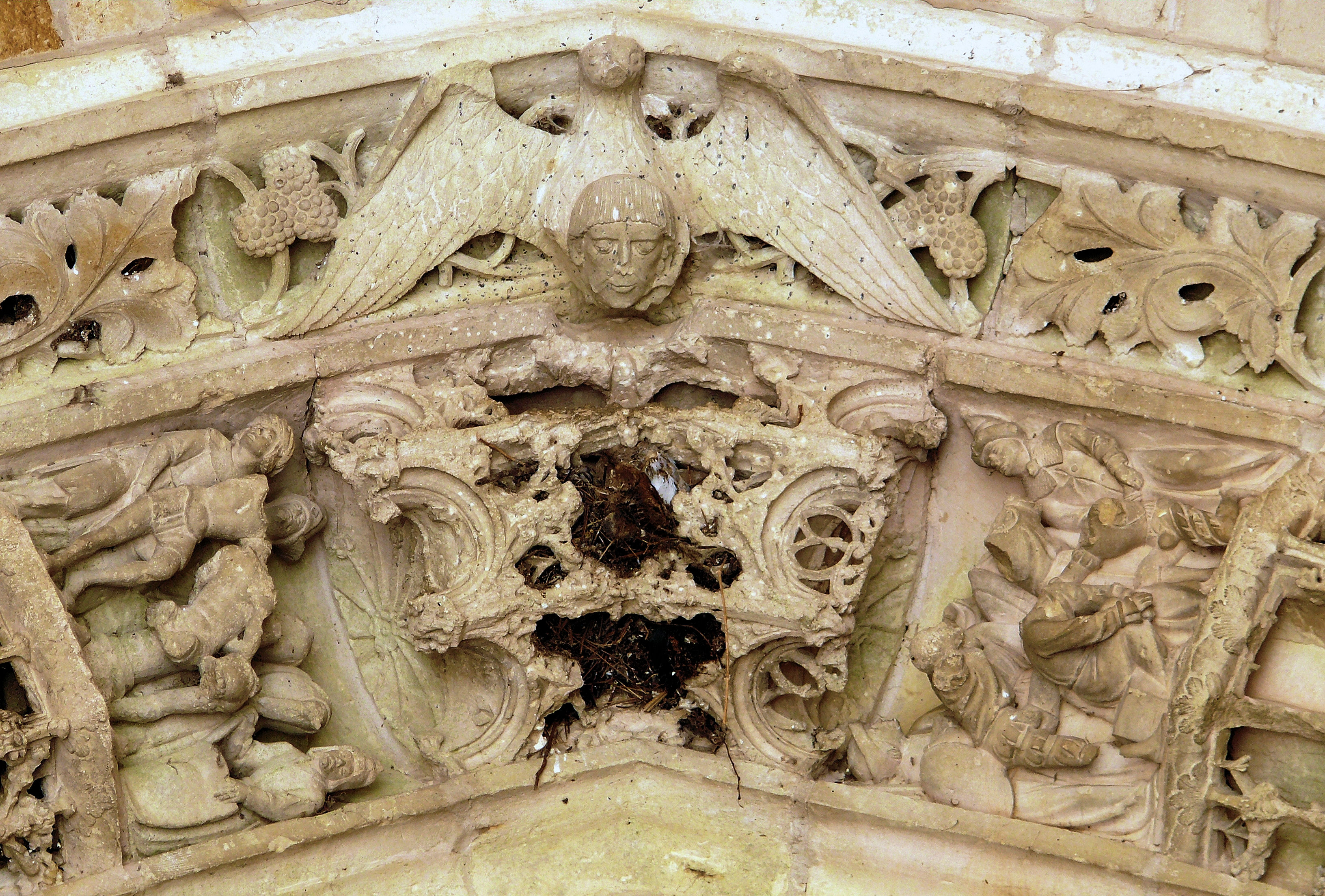 Rembercourt-Sommaisne - Portail central - Détail des voussures à la clé